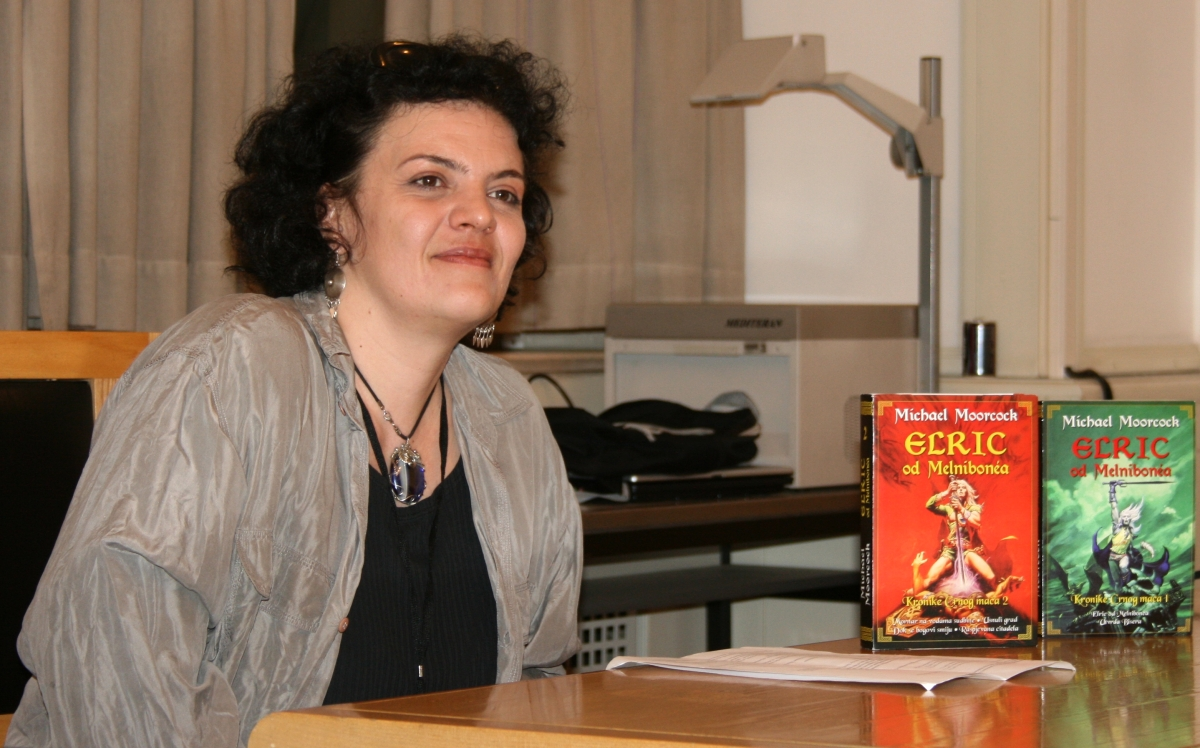 Milena Benini na SFeraKonu, Zagreb